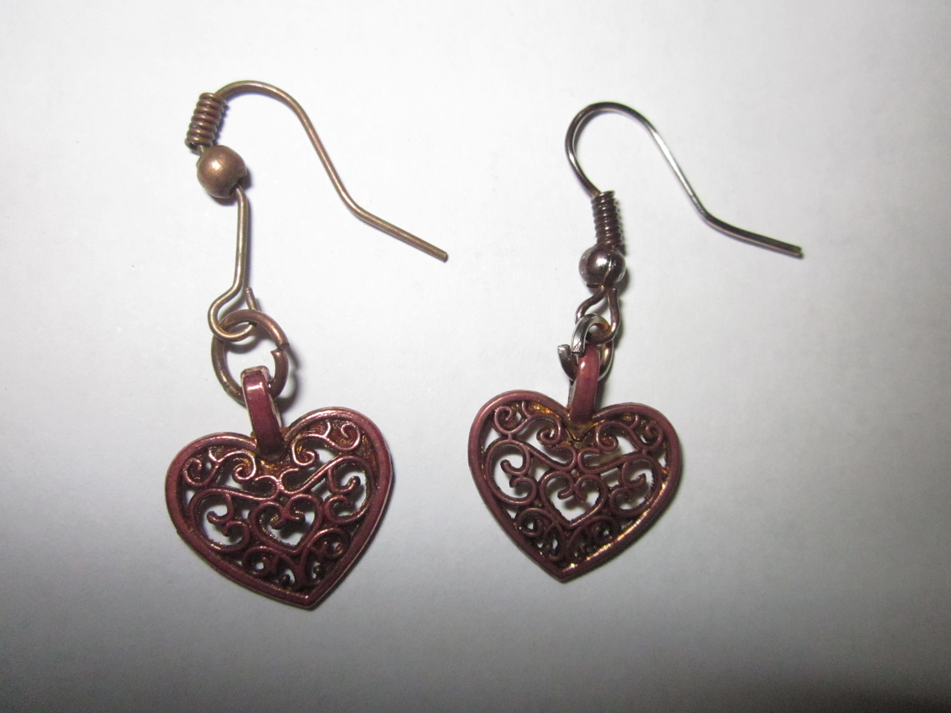 گوشواره ساخته شده از فلز مس